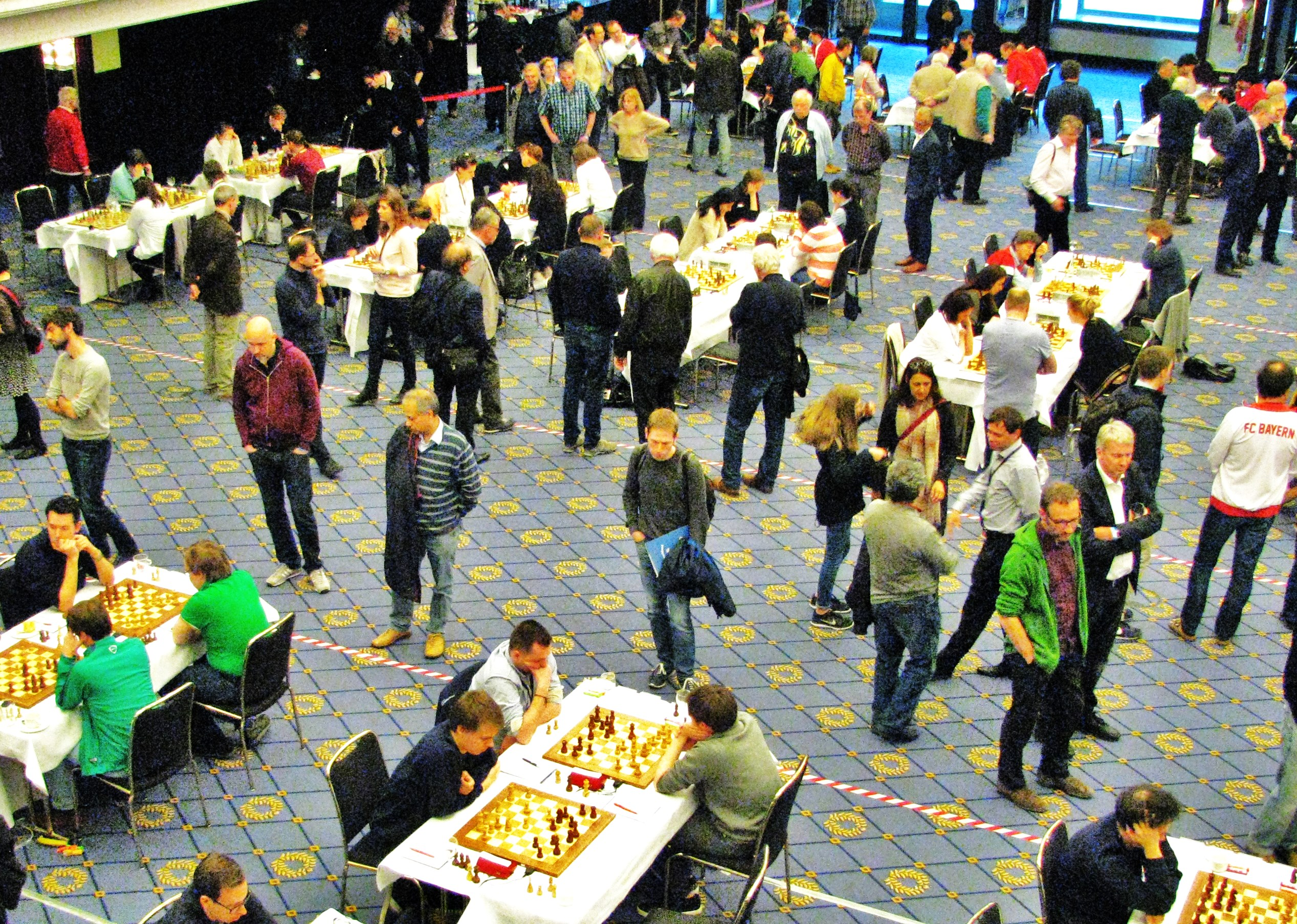 Bundesliga-Endrunde 2016/17 im Hotel Maritim Berlin